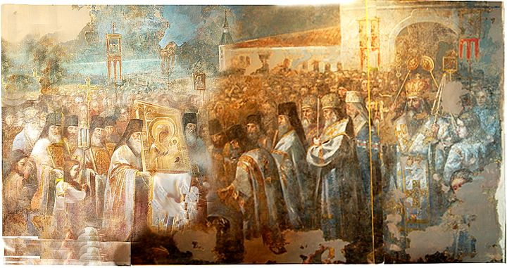 Фресковая живопись Успенского собора, с изображением встречи патриархом Никоном Иверской иконы Божьей Матери из Москвы.